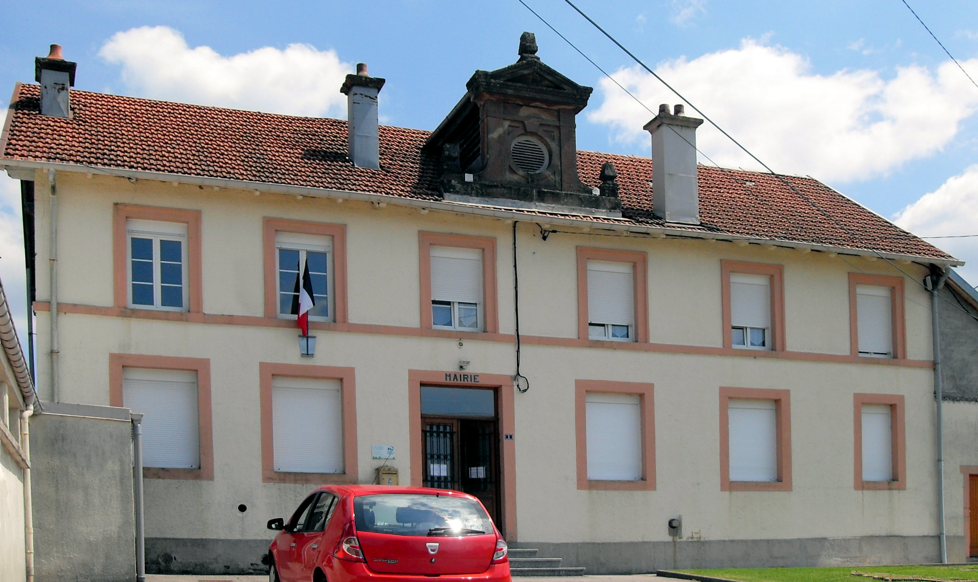 La mairie-école de Barbey-Seroux